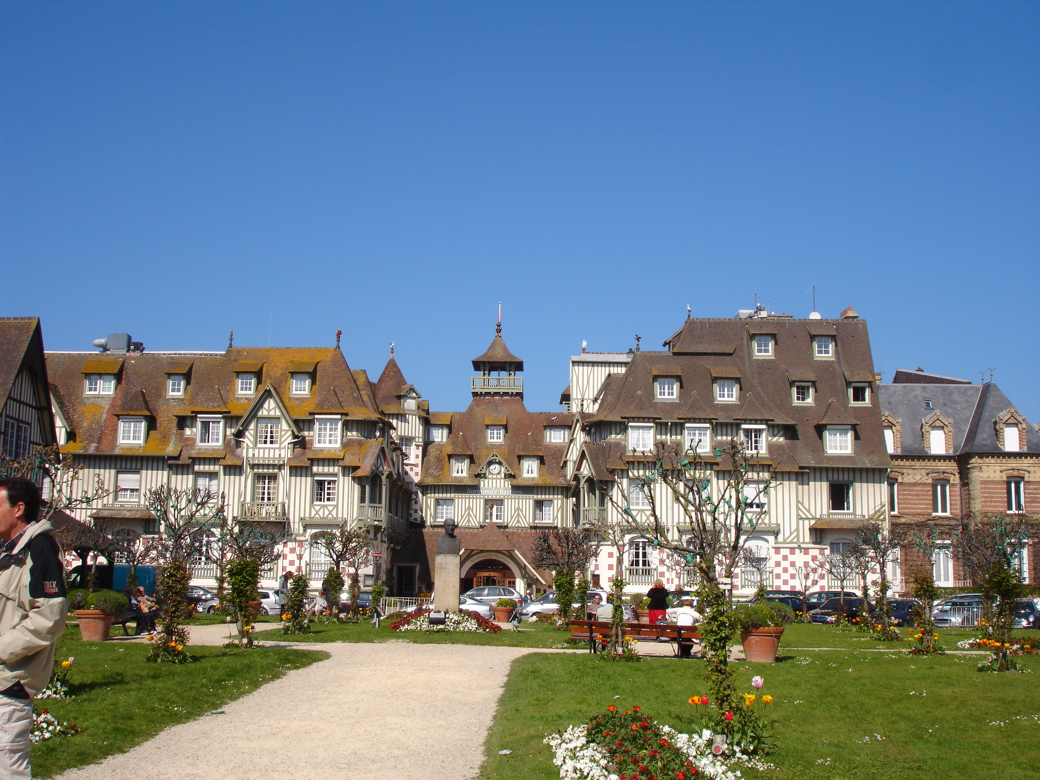 France, Calvados (14), Deauville, hôtel Normandy